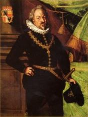 Karl I von Liechtenstein (Carlos II). Príncipe de Liechtenstein (1608 - 1627)